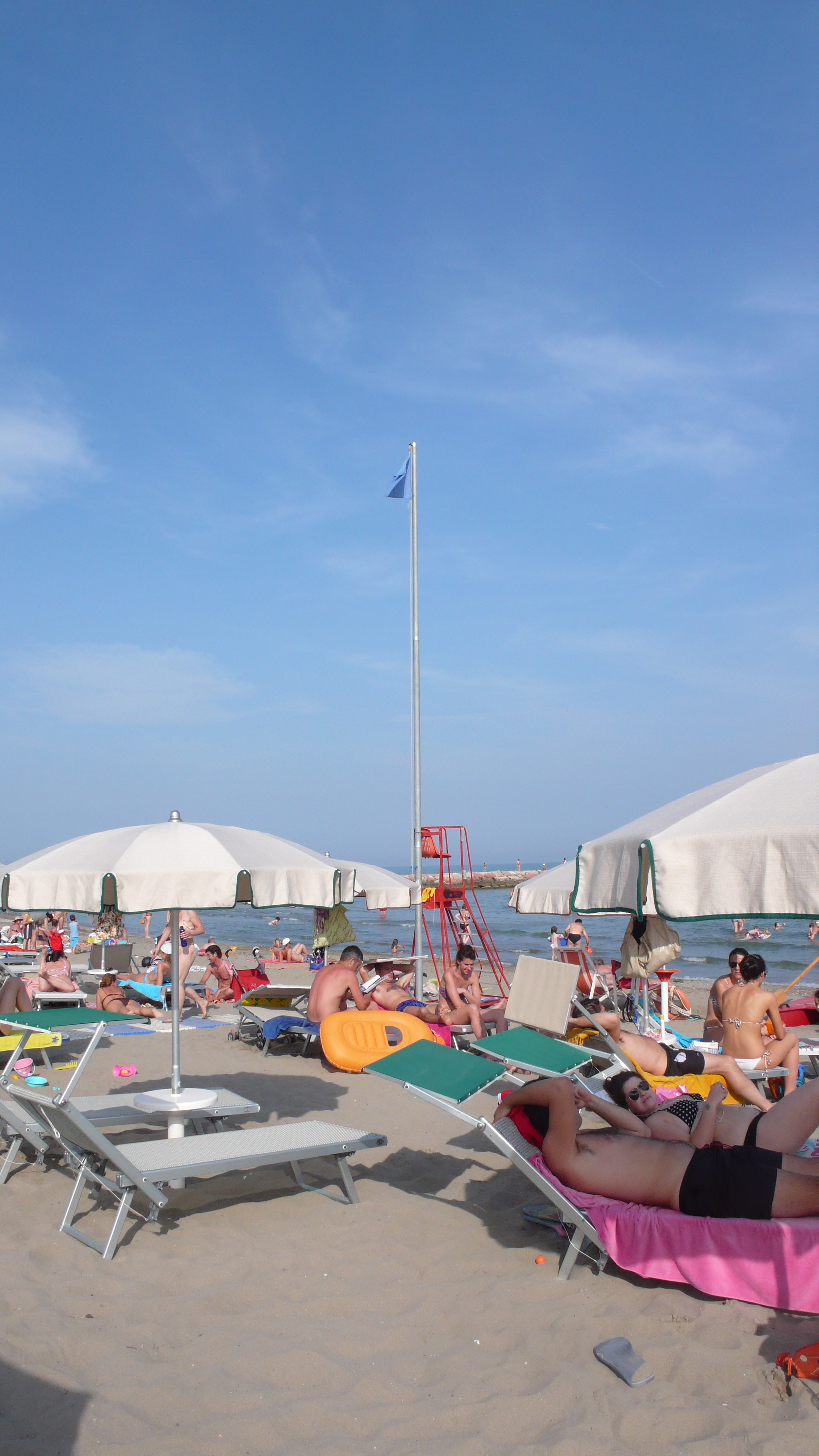 Bandiera Blu 2009 a Eraclea Mare